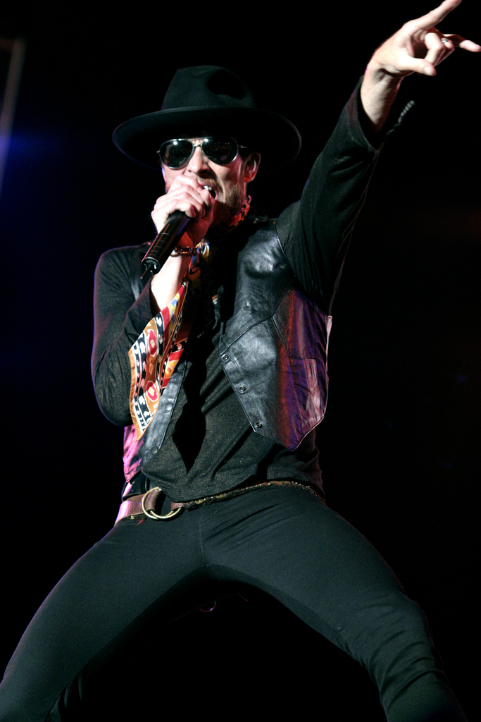 Velvet Revolver - Scott Weiland